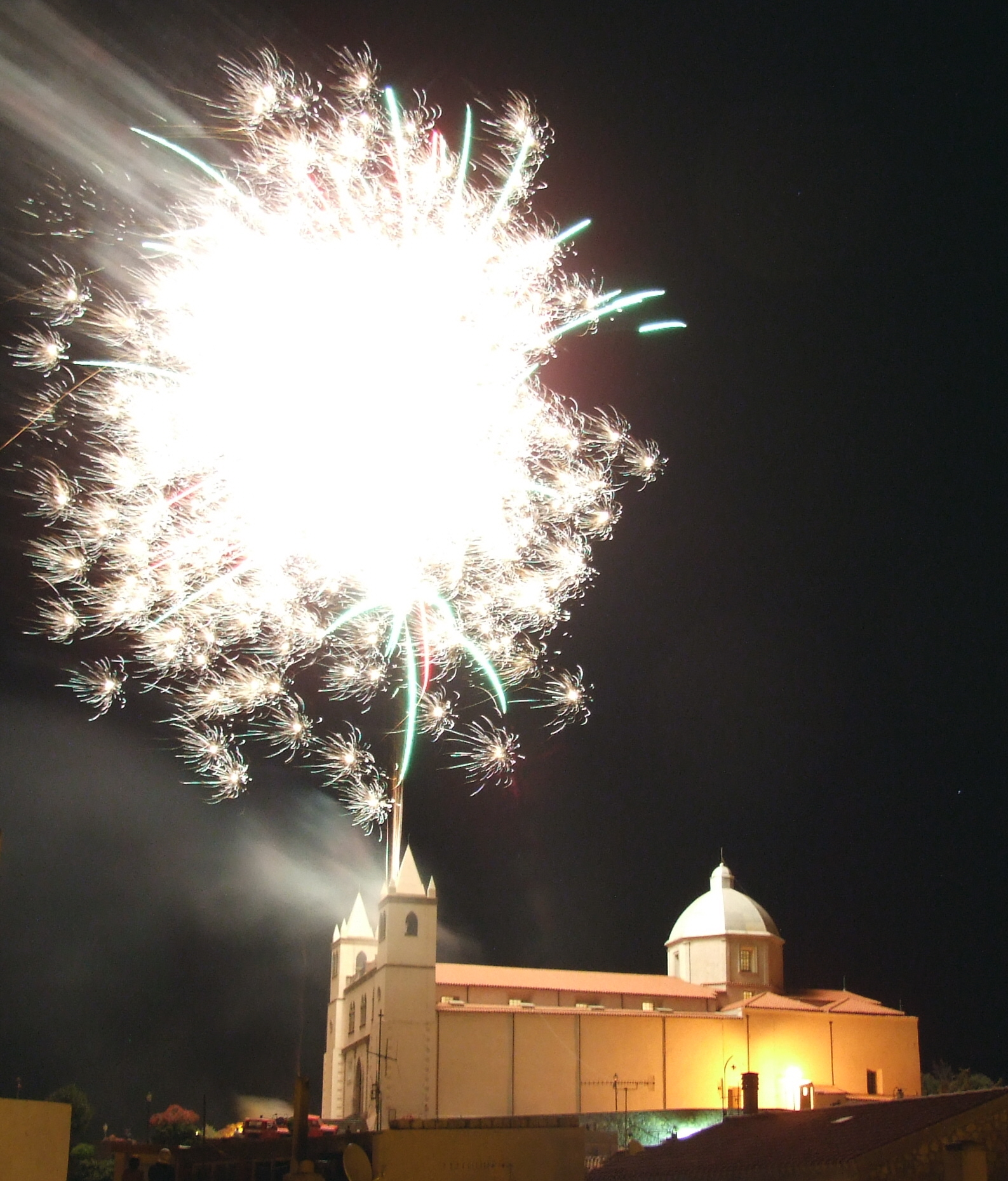 Fuochi artificiali per la festa di Santa Maria